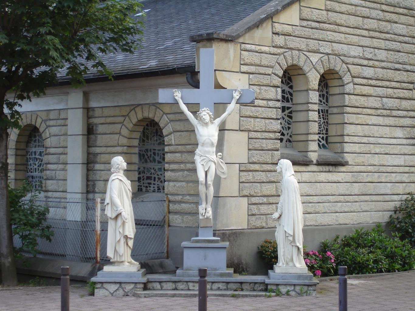 Calvaire de l'église Notre-Dame à Beauchamp (Val-d'Oise), France